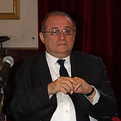 Giuliano Soria